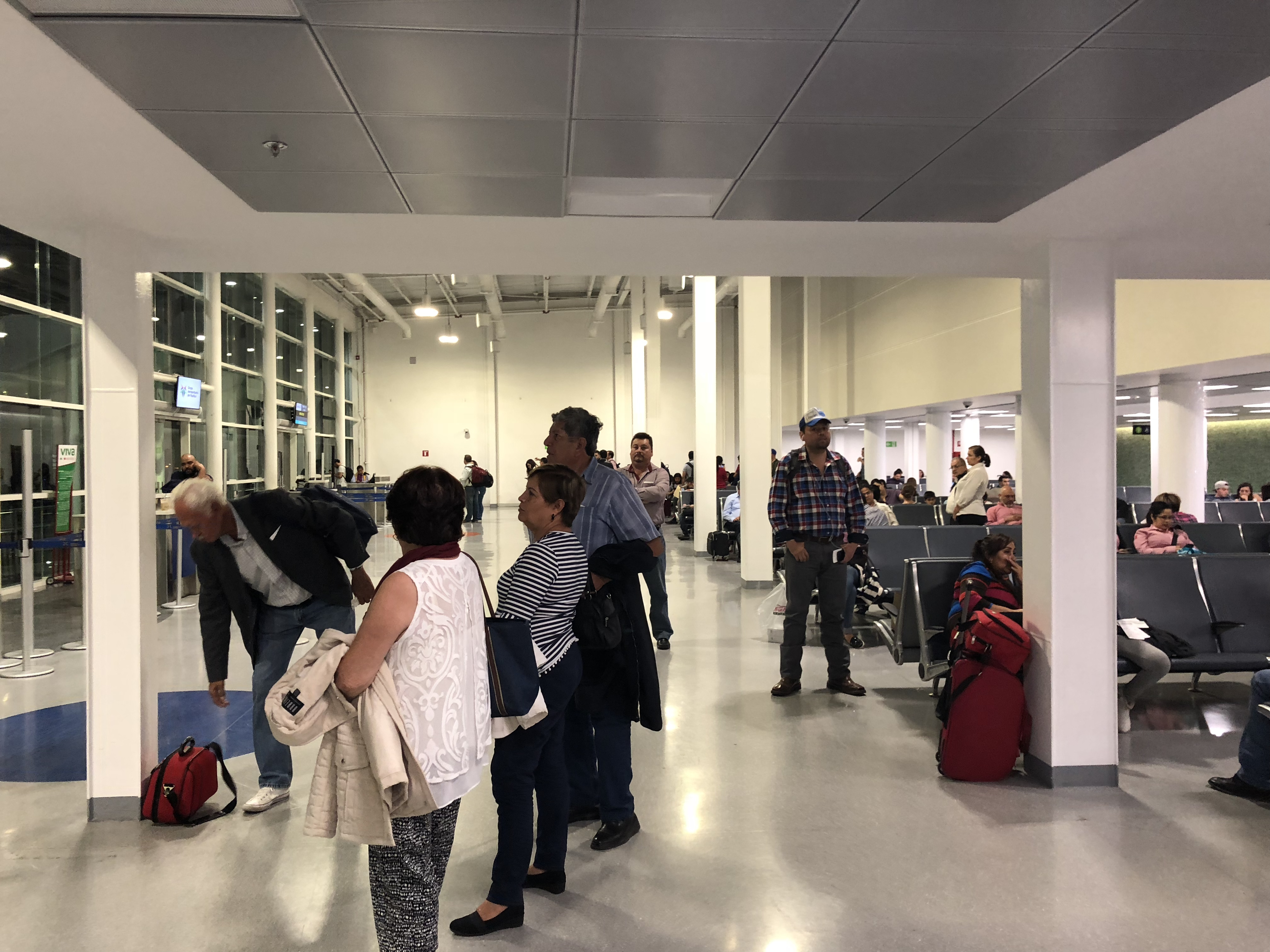 Sala A del Aeropuerto Internacional de Guadalajara.